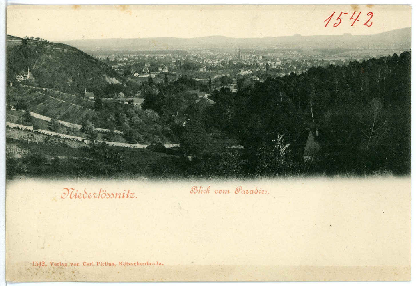 Niederlößnitz; Blick vom Paradies This postcard is from publisher Brück & Sohn in Meißen ( postcard has a unique number 01542 and is available in a higher resolution at the publisher. This images was uploaded in a cooperation project between Wikipedians and the publisher.